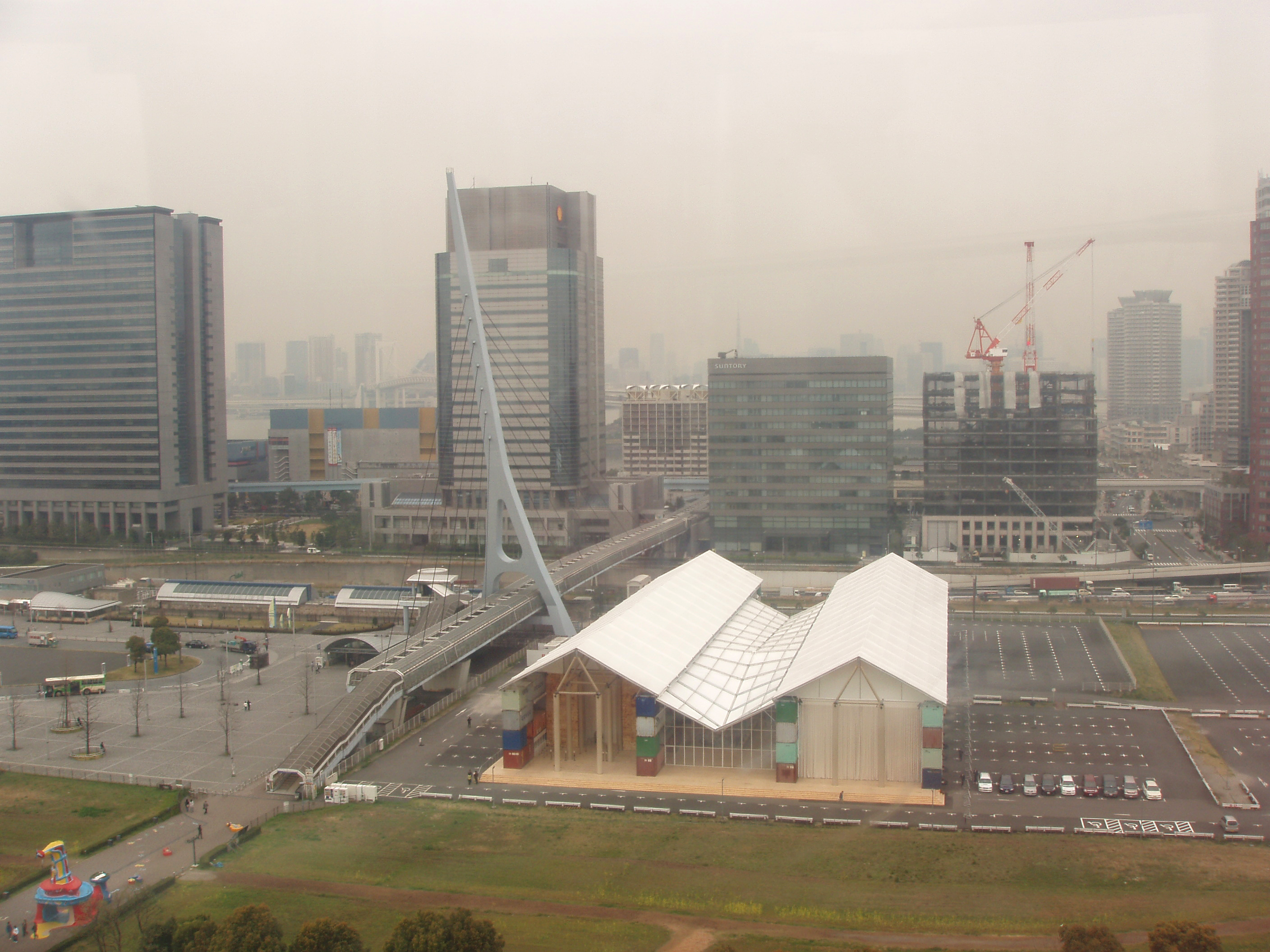 Nomadic Museum 04